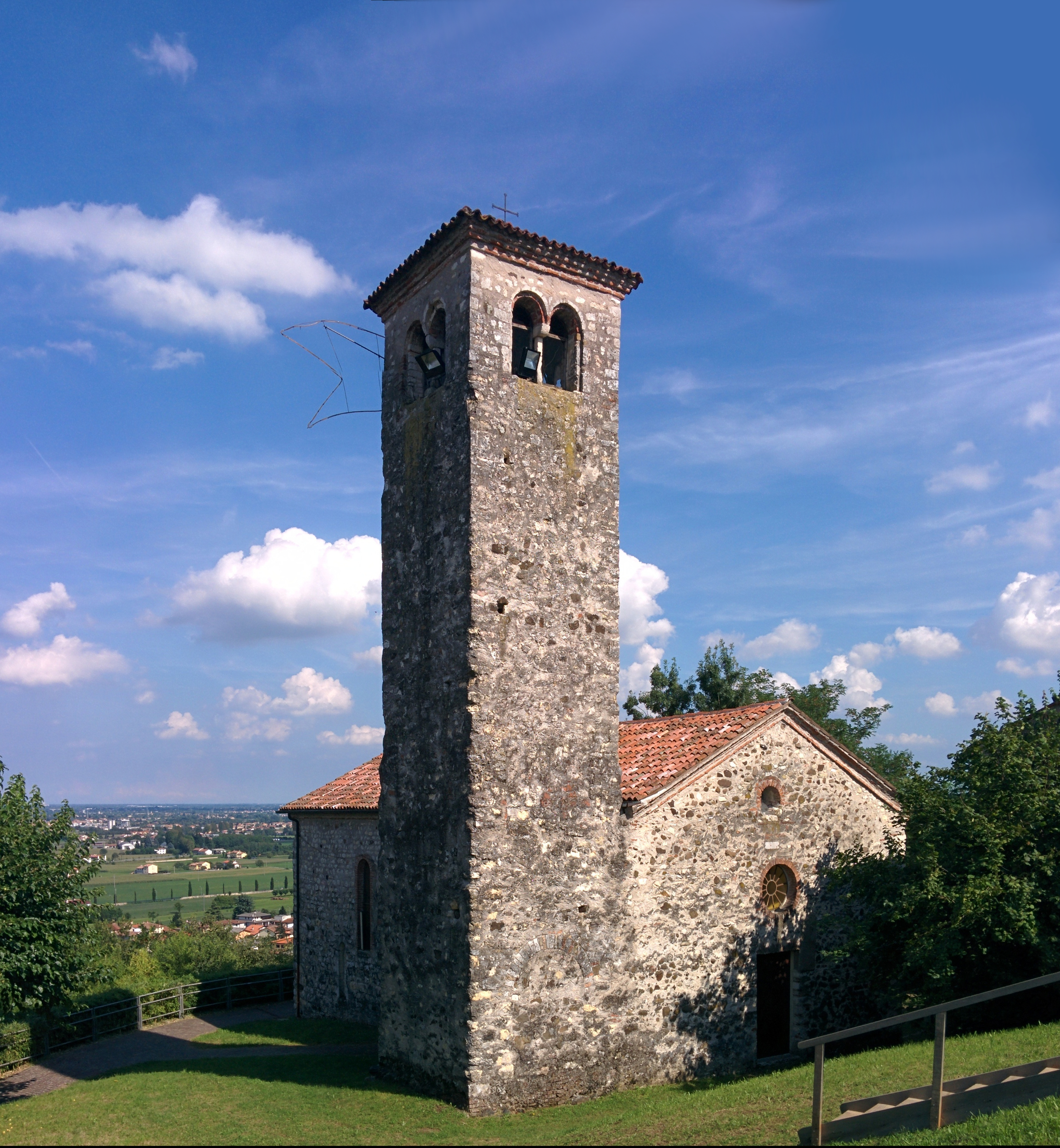 Chiesa di San Lorenzo a Castelnovo di Isola Vicentina, in provincia di Vicenza.